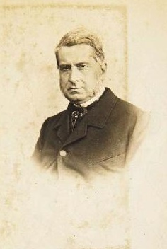 Joaquín Roncali y Ceruti, fotografía de J. Laurent, Museo de Historia de Madrid